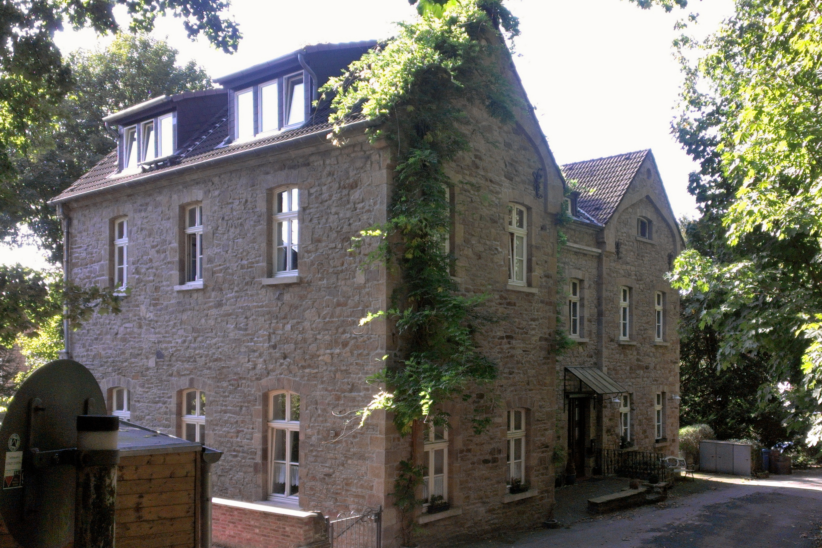 Altes Rathaus in Essen-Kupferdreh, unter DenkmalschutzThis is a photograph of an architectural monument.